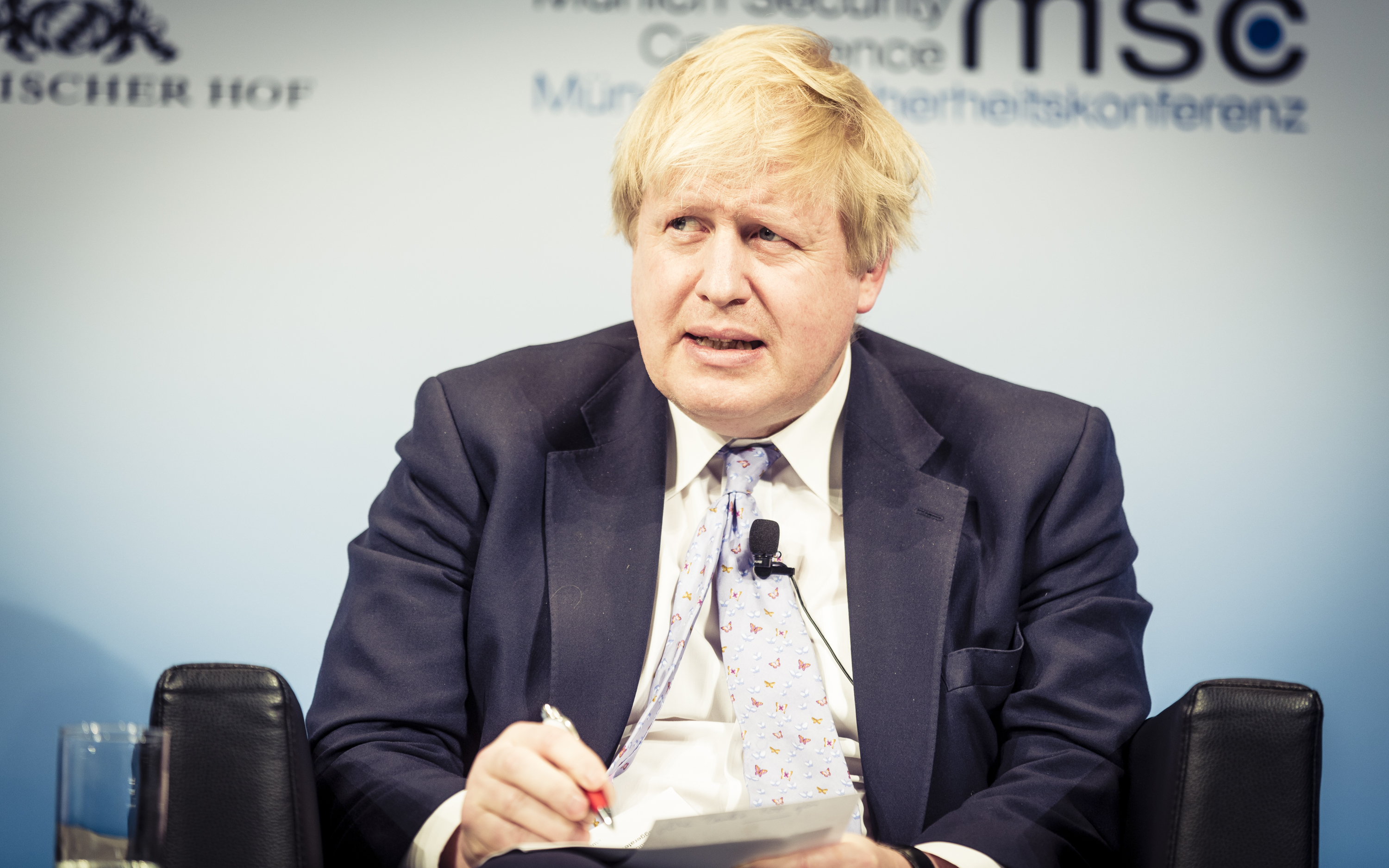 Boris Johnon während der Münchner Sicherheitskonferenz 2017